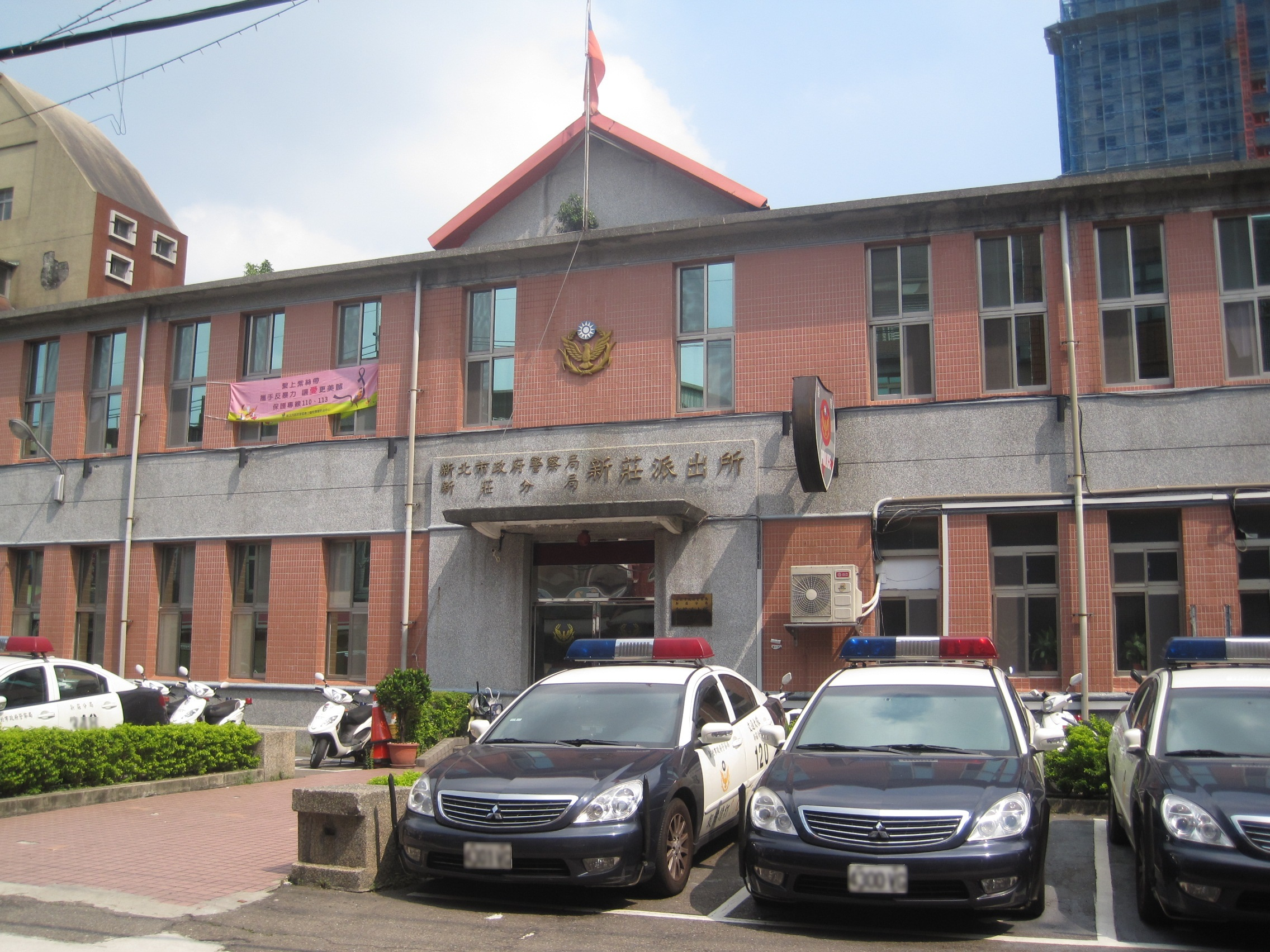 新北市政府警察局新莊分局新莊派出所，該建築原為新莊郡役所